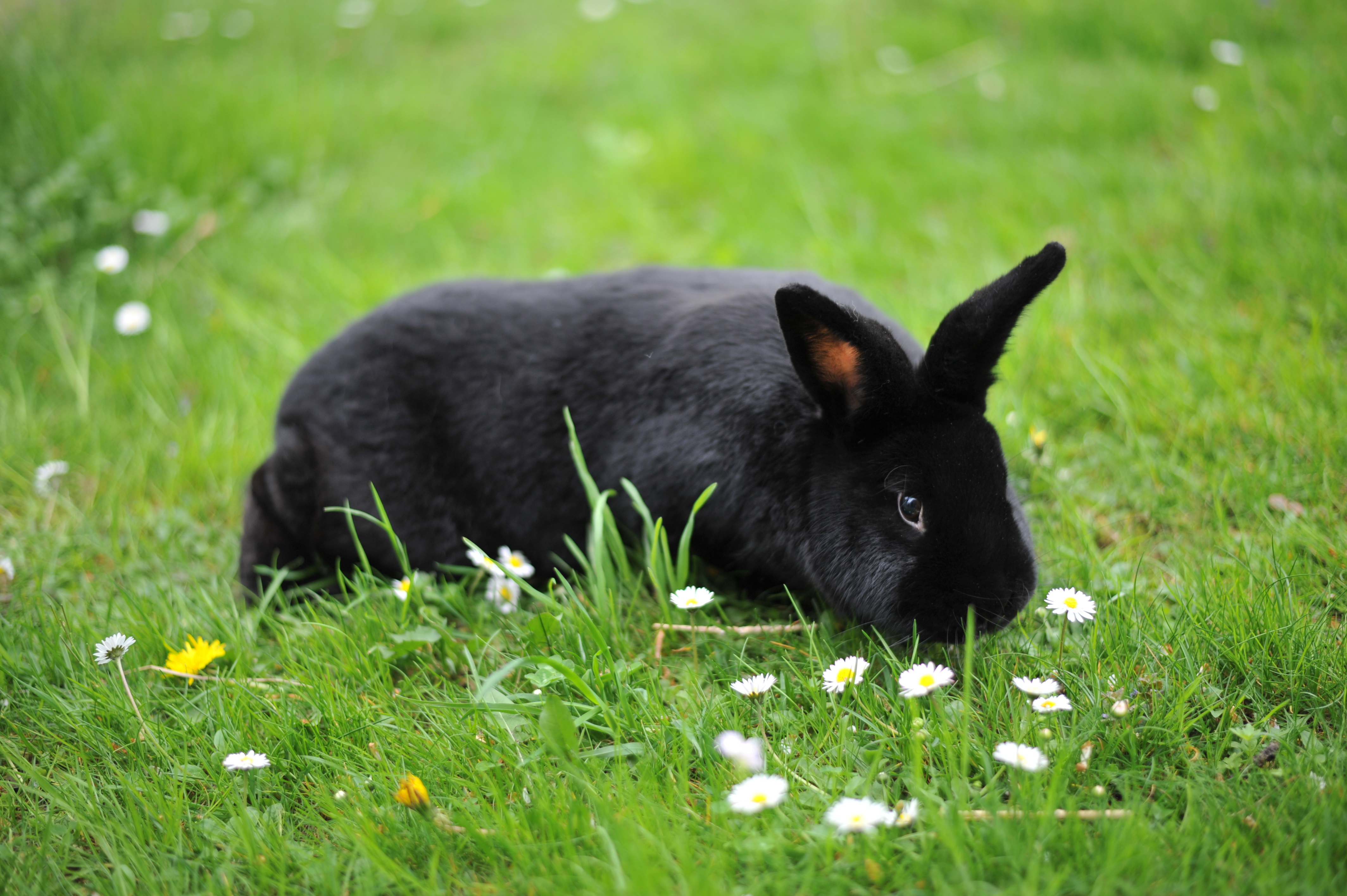 Rassekaninchen Alaska schwarz